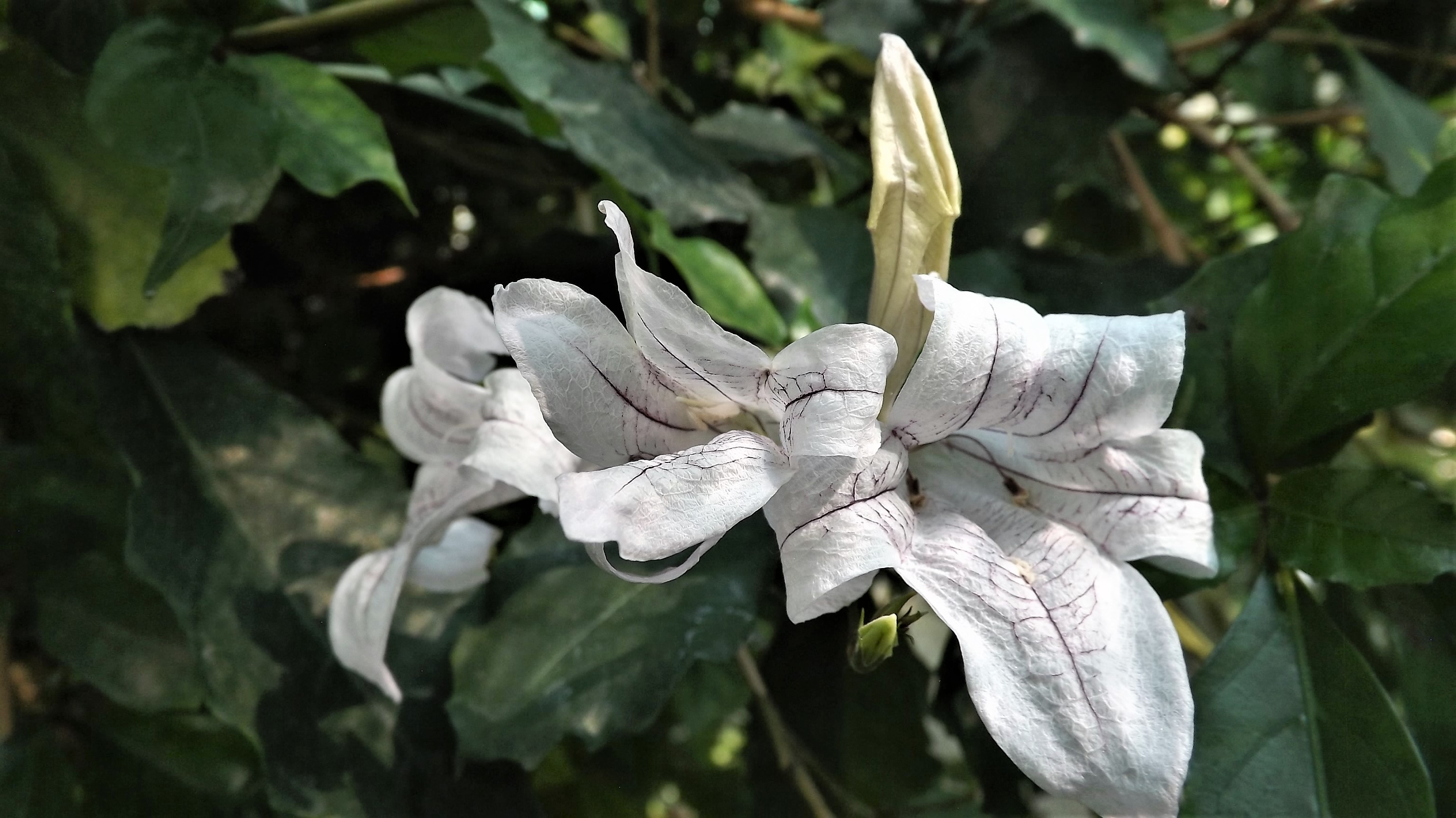 Vácrátóti botanikuskert üvegháza